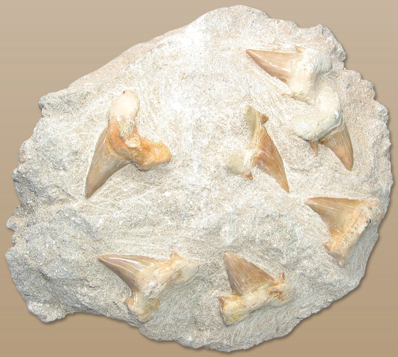 Fossile Haizähne Otodus obliquus Fundort: Khourigba, Plateau des Phosphates, Marokko Alter: ca. 70 Millionen Jahre, Zeitalter: Teritär, Paläozän (Kreide)